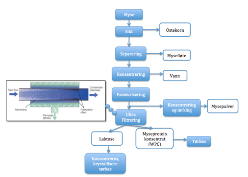 Prosessering av myse